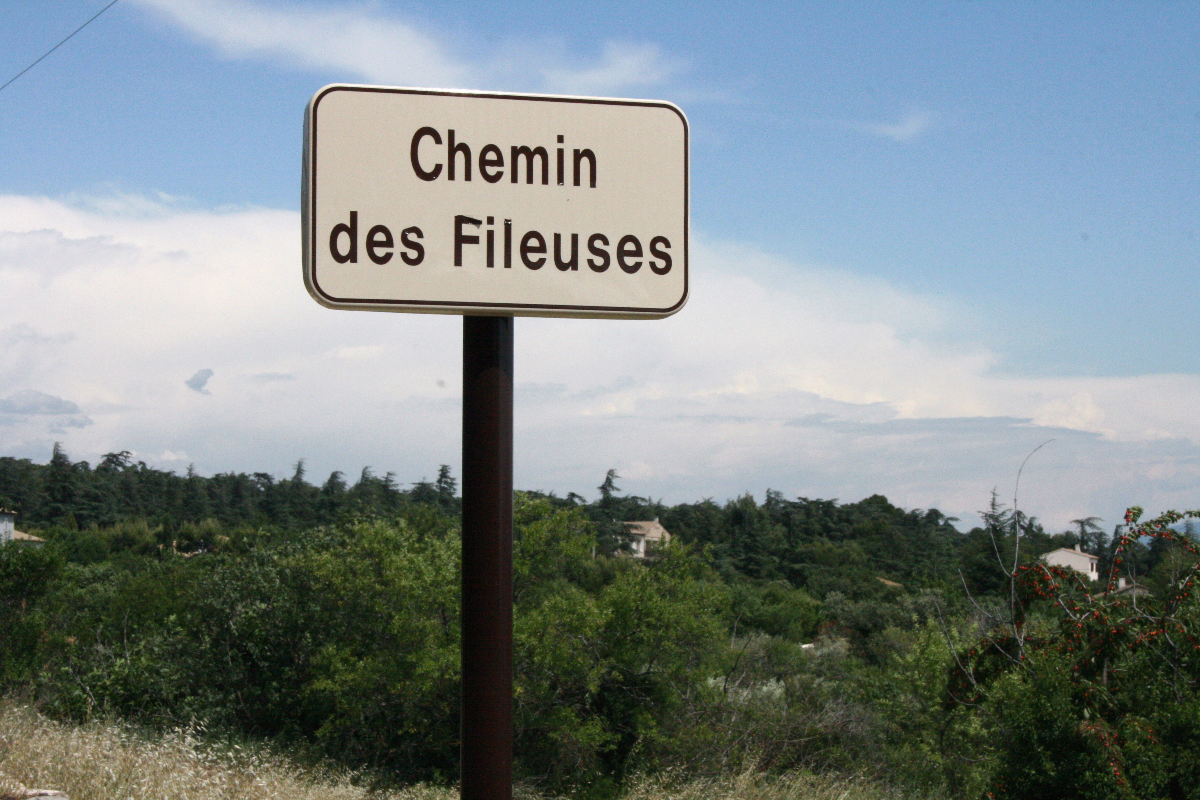 Chemin des fileuses à Cabrières-d'Avignon, département du Vaucluse (France). Il doit son nom aux ouvrières qui l'empruntaient au XIXè siècle pour aller travailler aux filatures de Fontaine-de-Vaucluse